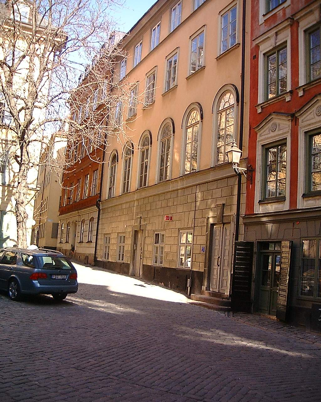 19, Själagårdsgatan, Gamla stan, Stockholm.